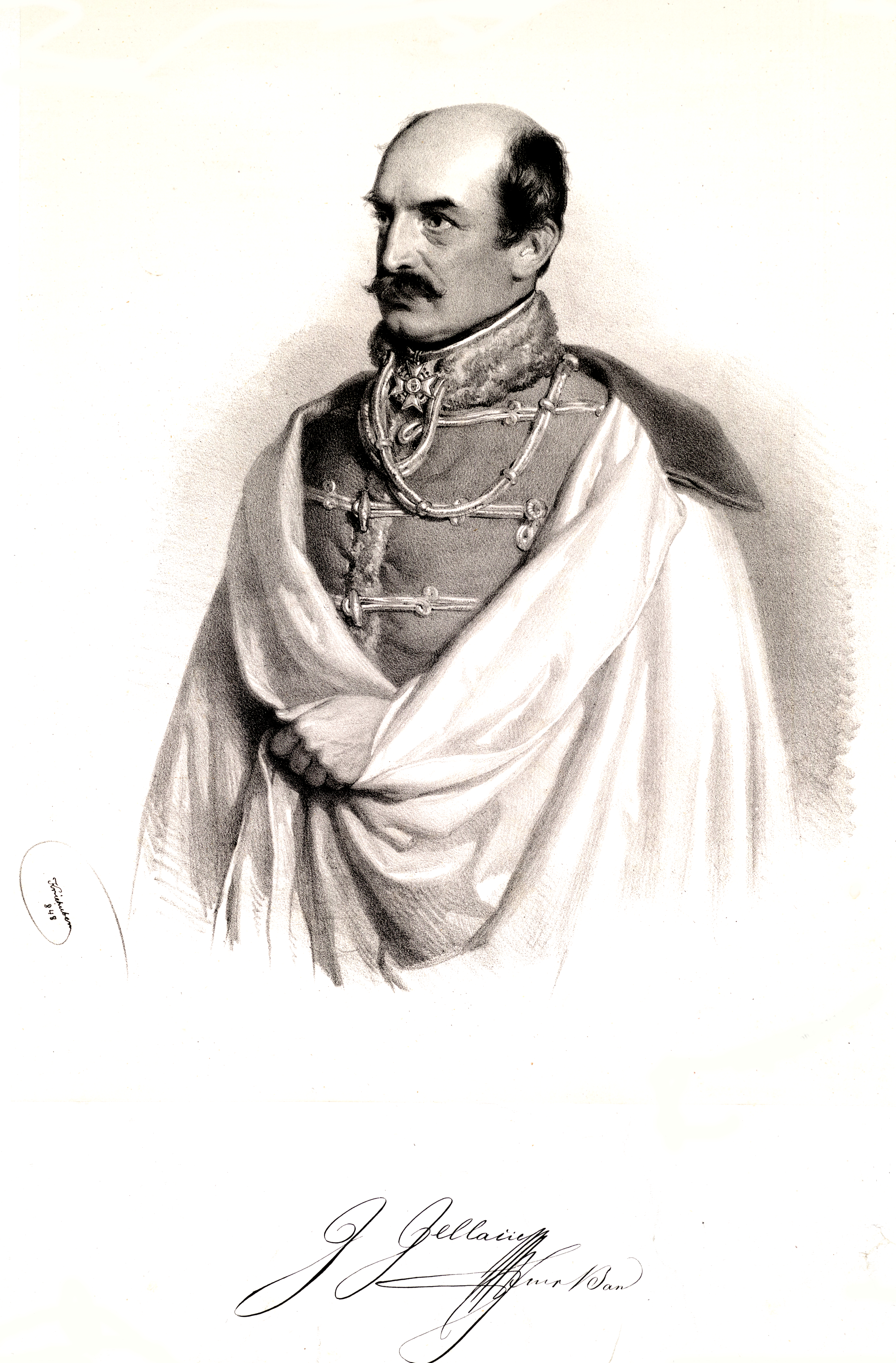 Joseph Graf Jelačić von Bužim (1801-1859) k. k. Feldzeugmeister, Ban von Kroatien, Kommandeur des Maria-Theresien Ordens.